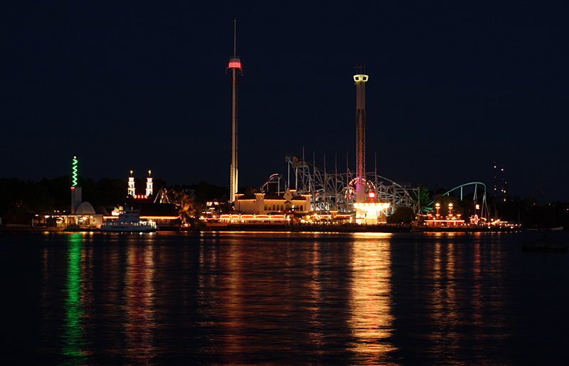 Gröna Lund, nattetid